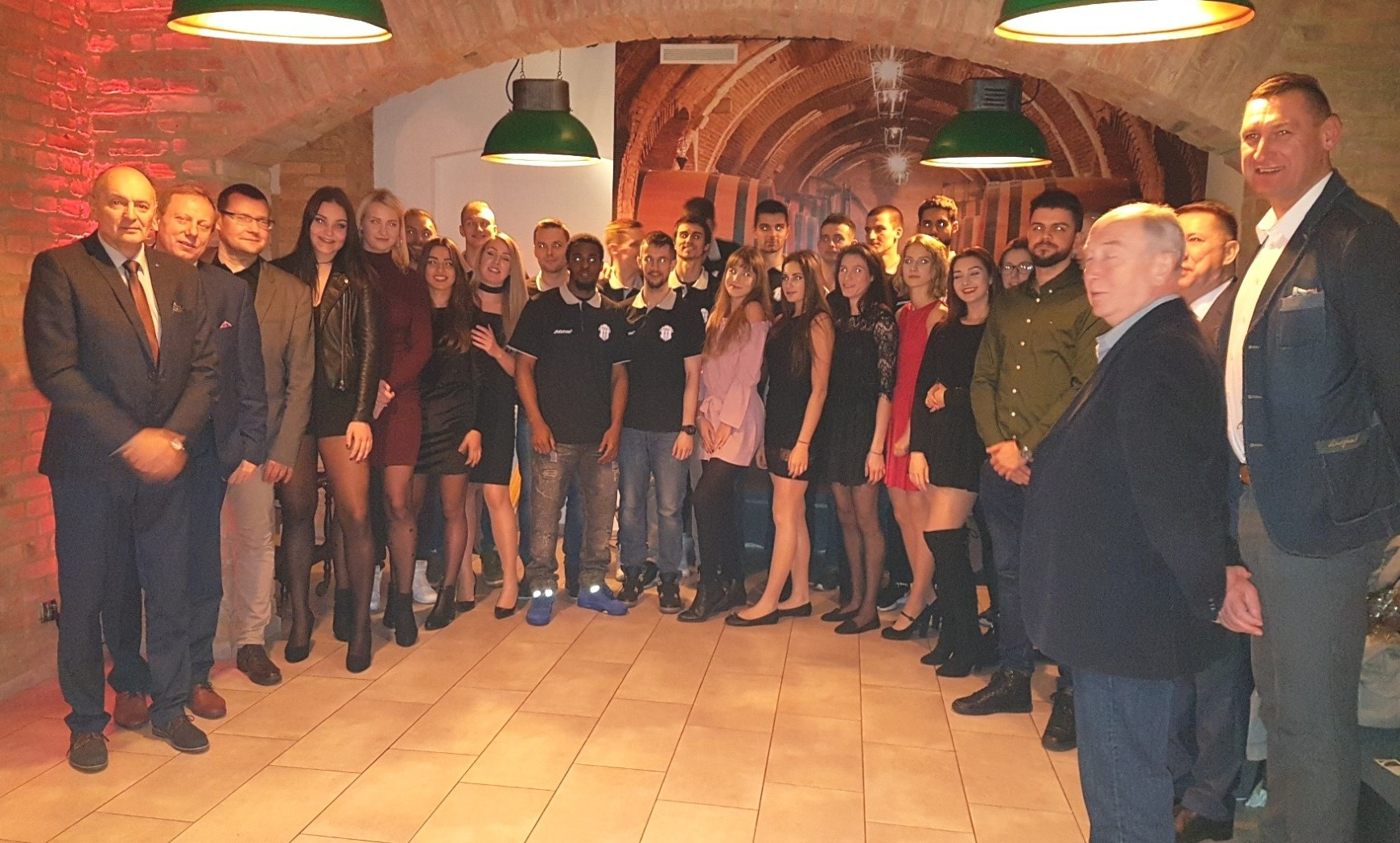 Spójnia Stargard podczas wigili (20.12.2018)